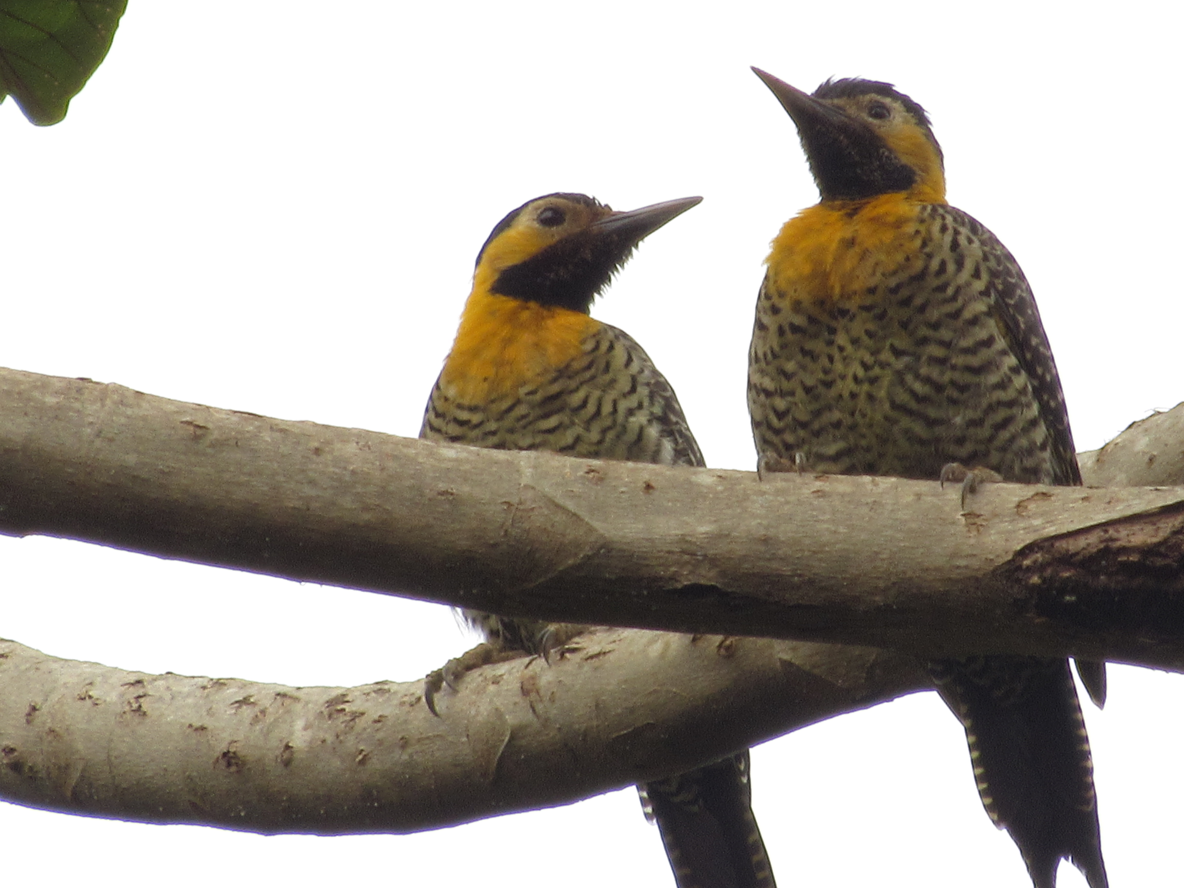 Casal de pica-paus amarelo na serra da mantiqueira. Estado de São Paulo.